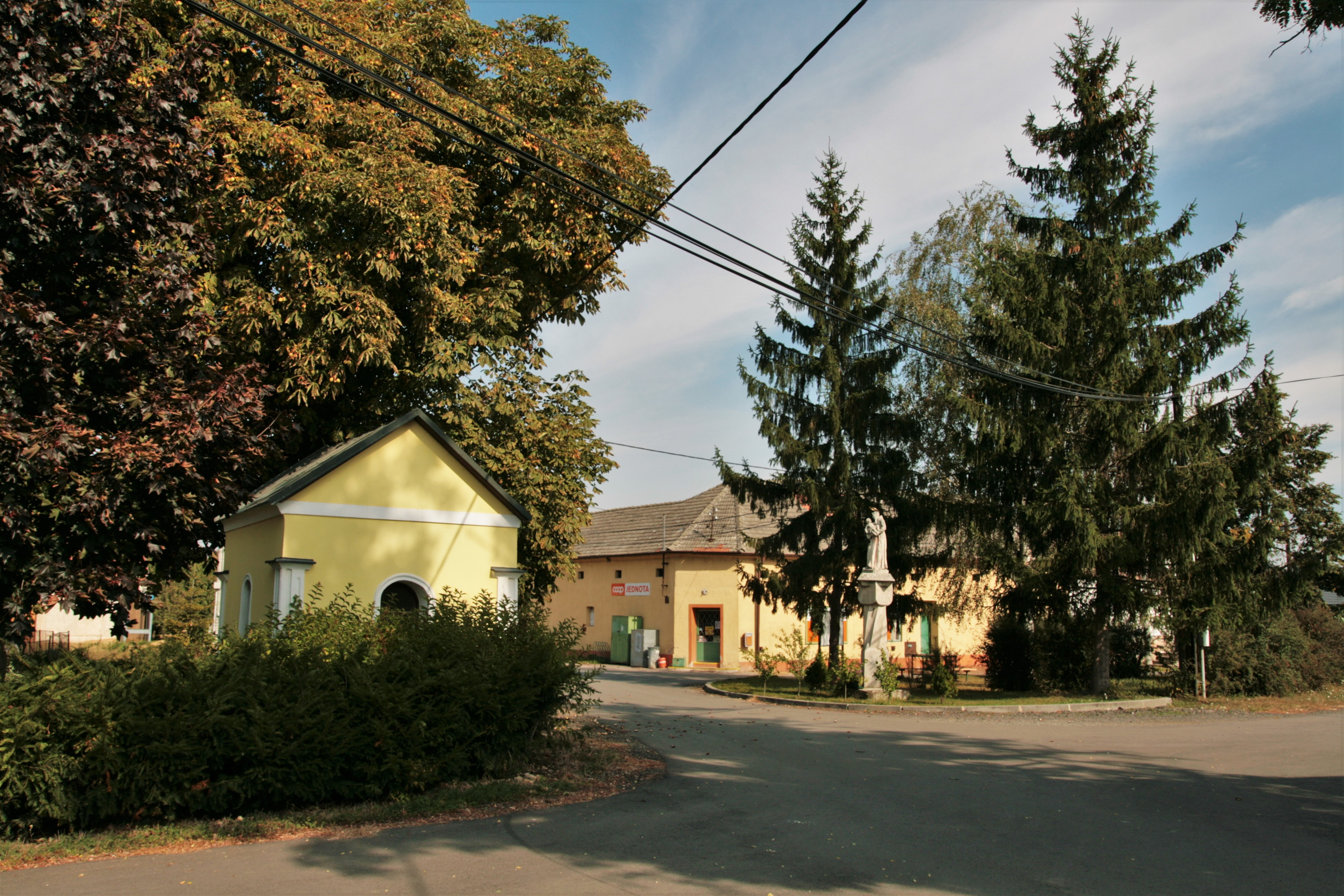 Obec Křídlůvky v okrese Znojmo. Kaple sv. Cyrila a Metoděje a socha sv. Antonína na návsi.